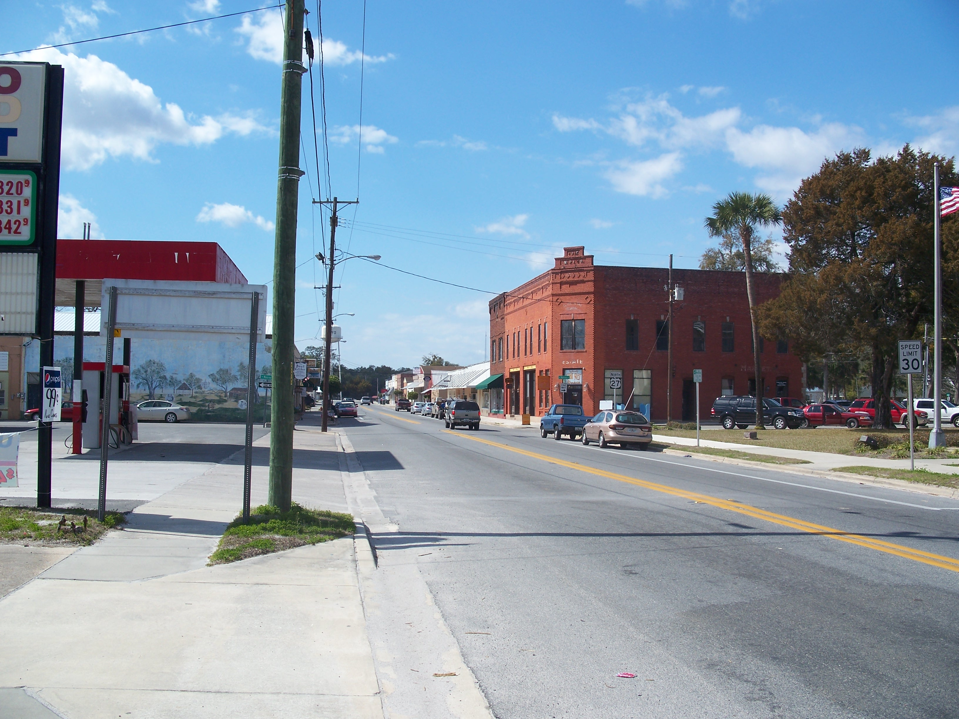 Mayo, Florida: US 27, looking west